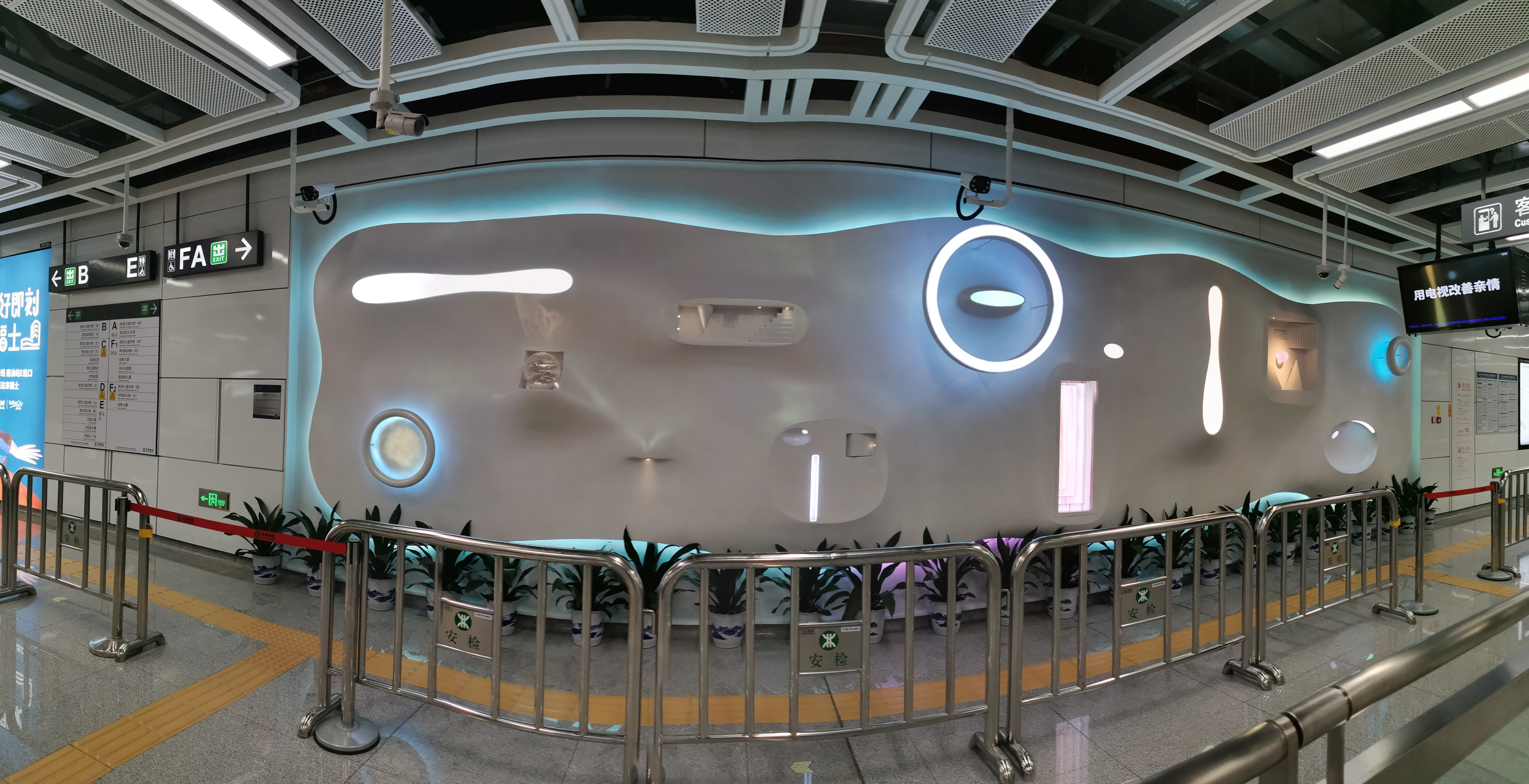 南油站艺术墙，位于站厅